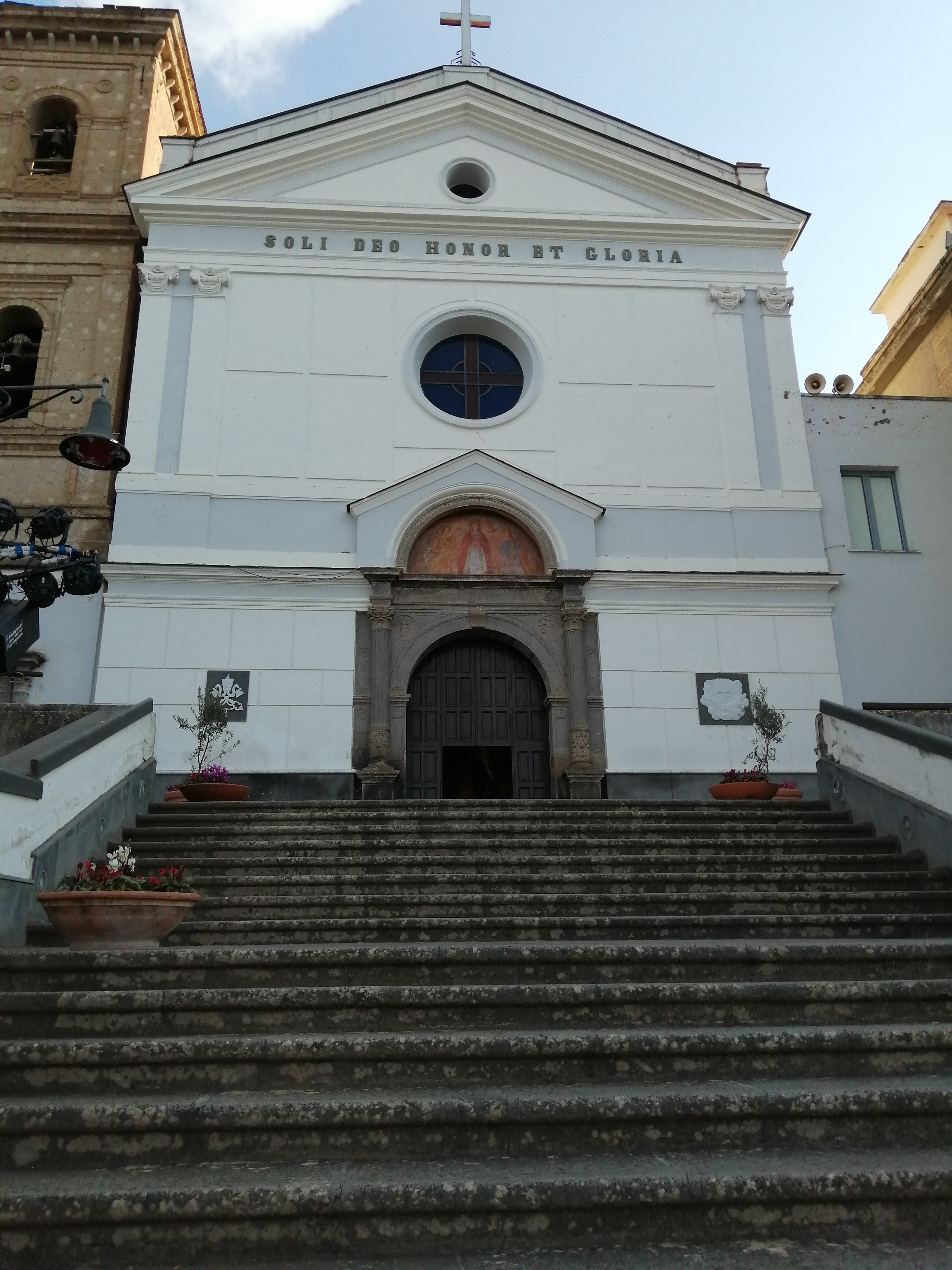 Veduta del santuario di Santa Maria a Parete, Liveri